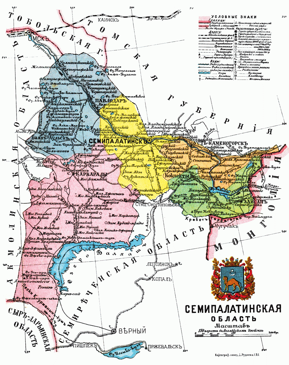 Карта Семипалатинской области, 1913